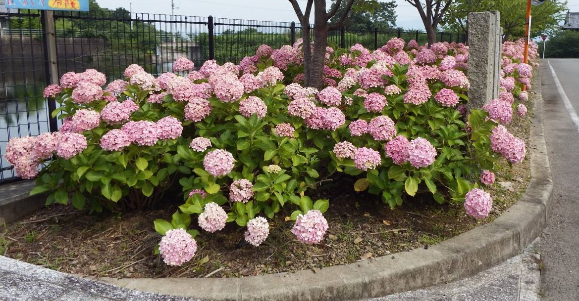 熊谷寺の紫陽花